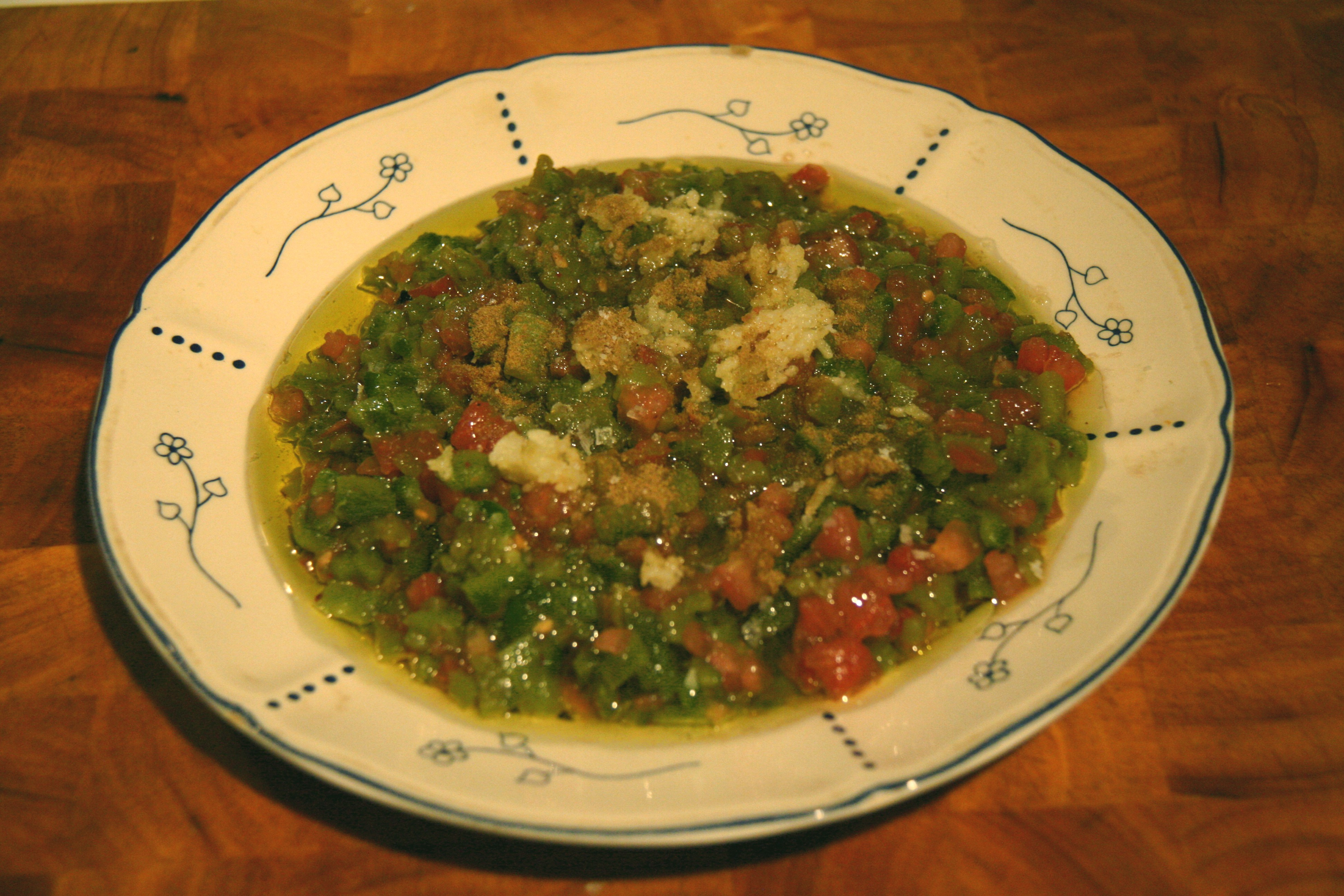 Ensalada marroquí